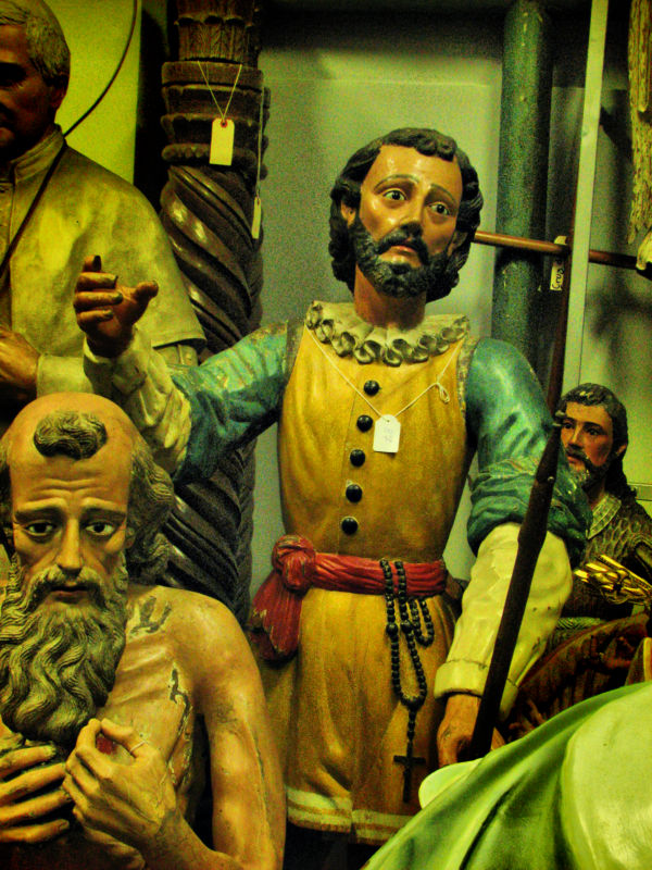 Esculturas religiosas, parte de la colección histórica del Museo Nacional de Costa Rica.